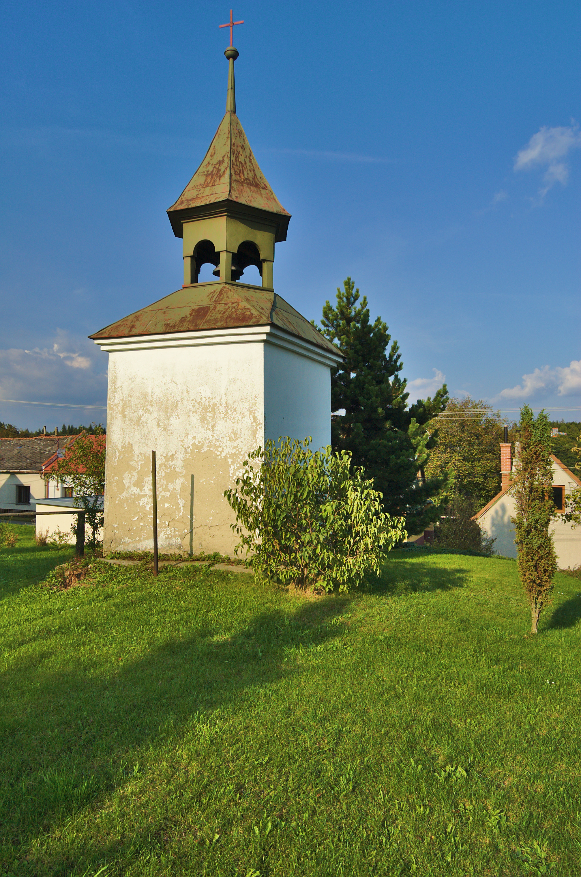 Kaple v obci Březina, Nové Sady, okres Vyškov